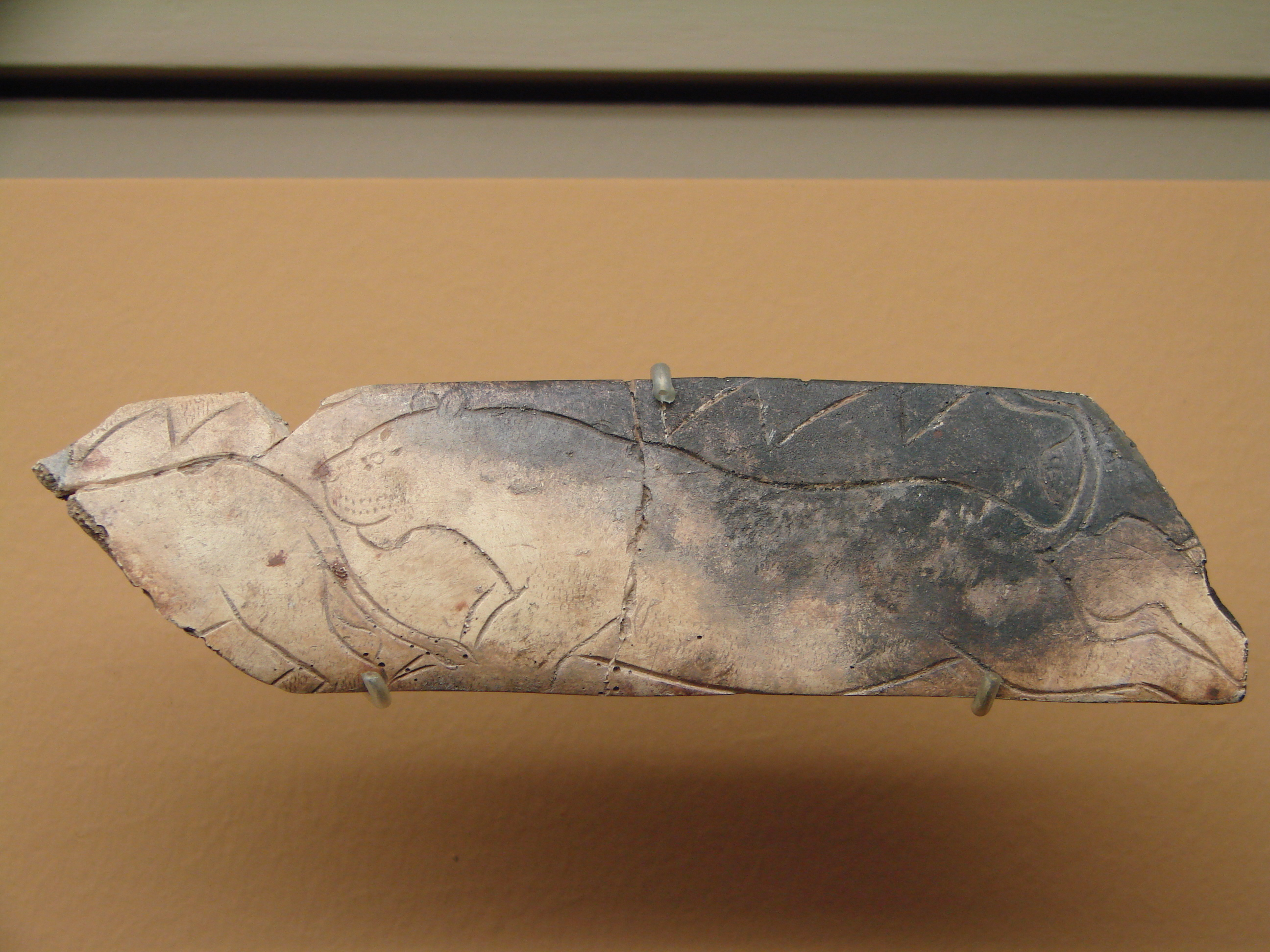 Os gravé figurant une frise de lions. Excavé à la grotte de la Vache (Ariège, France). Exposé au Musée des Antiquités Nationales, Saint-Germain-en-Laye (Yvelines, France).Photo complémentaire